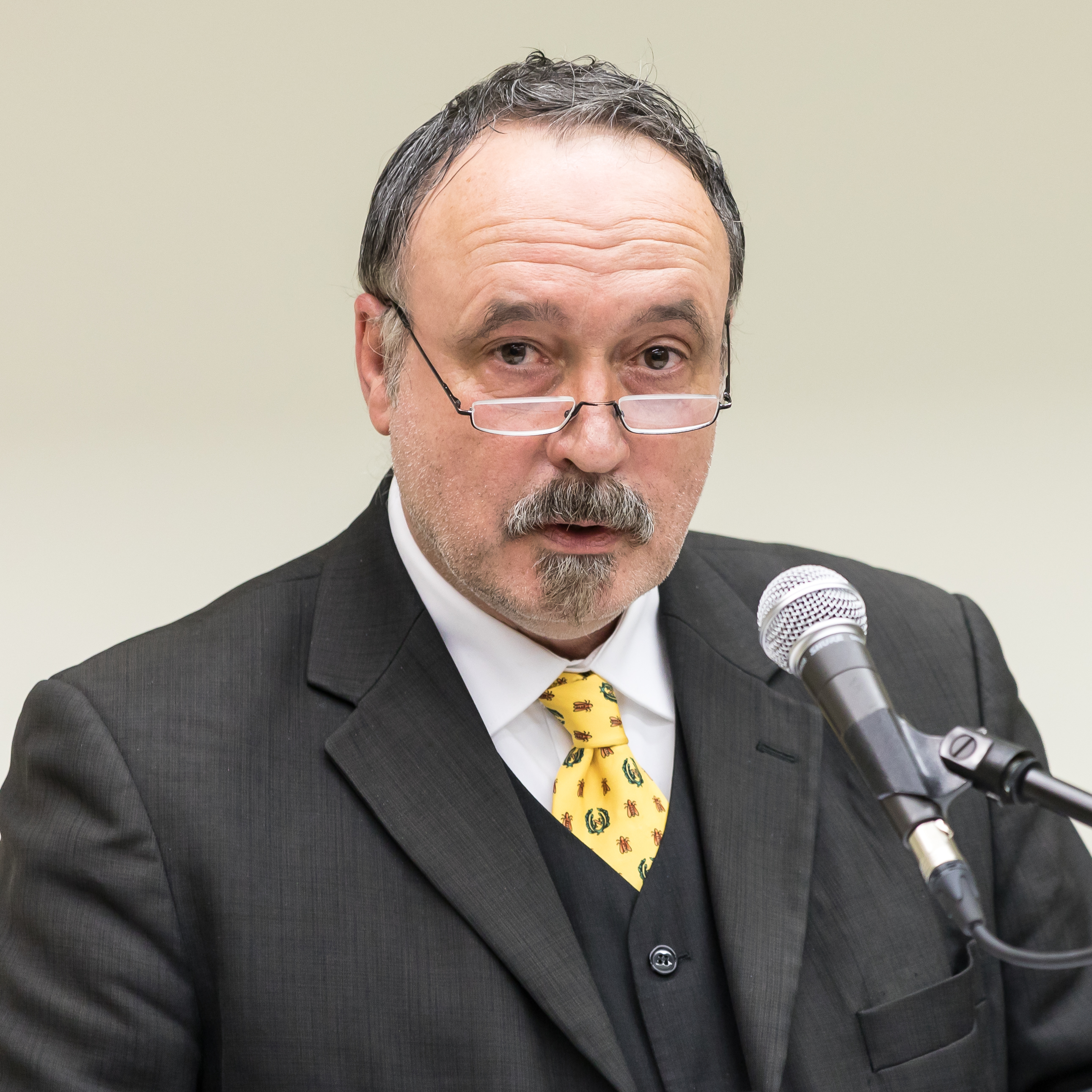 Ausstellungseröffnung „Trotzdem Alaaf!“ und „Im rechten Licht“ im Kölnischen Stadtmuseum Foto: Mario Kramp, Direktor Kölnisches Stadtmuseum